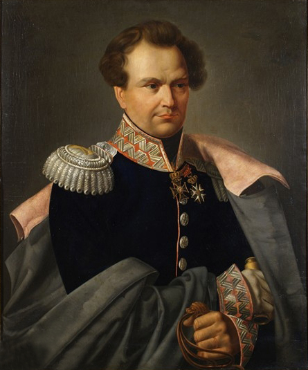 Generał Jan Zygmunt Skrzynecki